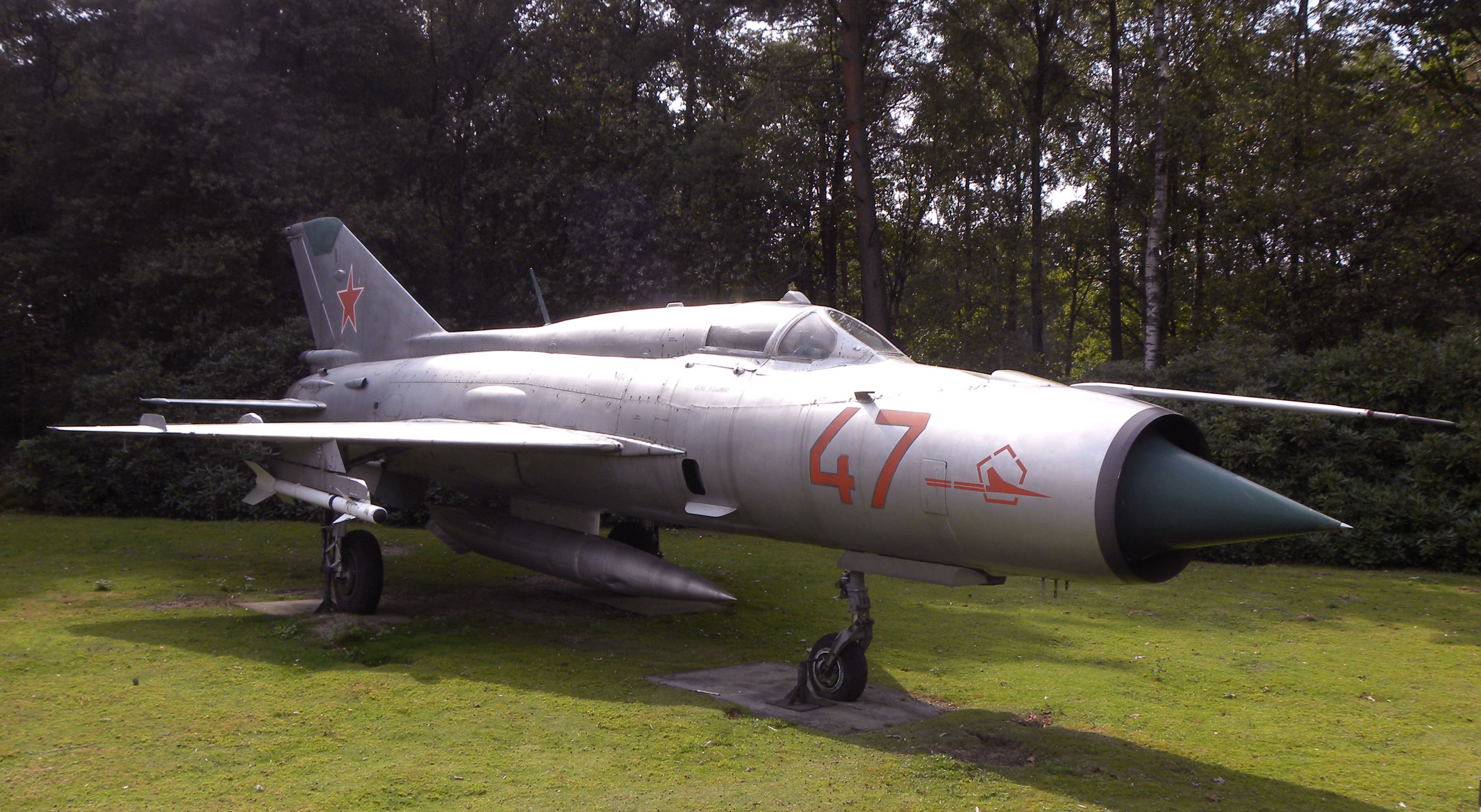 seen at militare luchtvaart museum Soesterberg